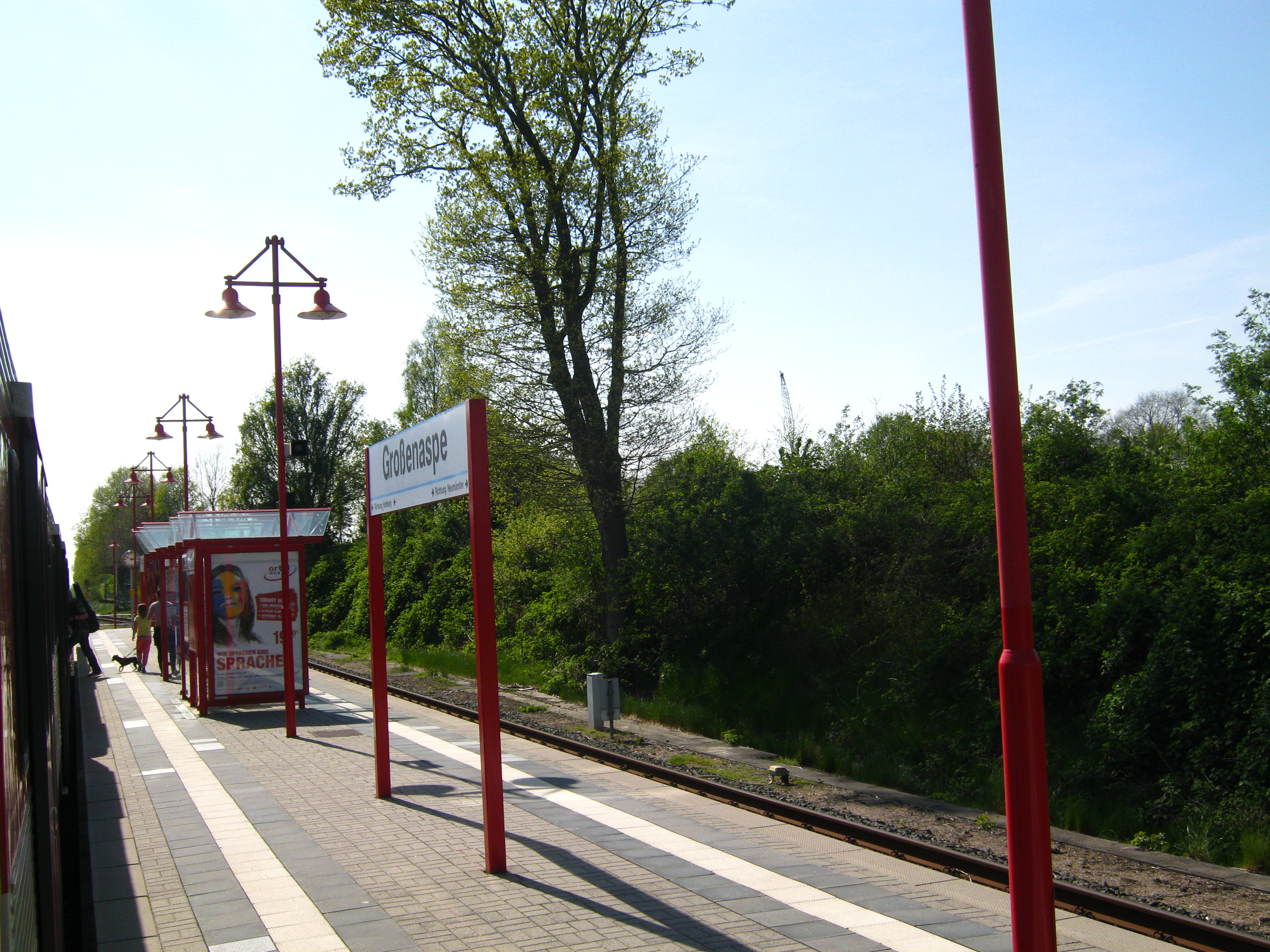 AKN Eisenbahn Station Großenaspe.